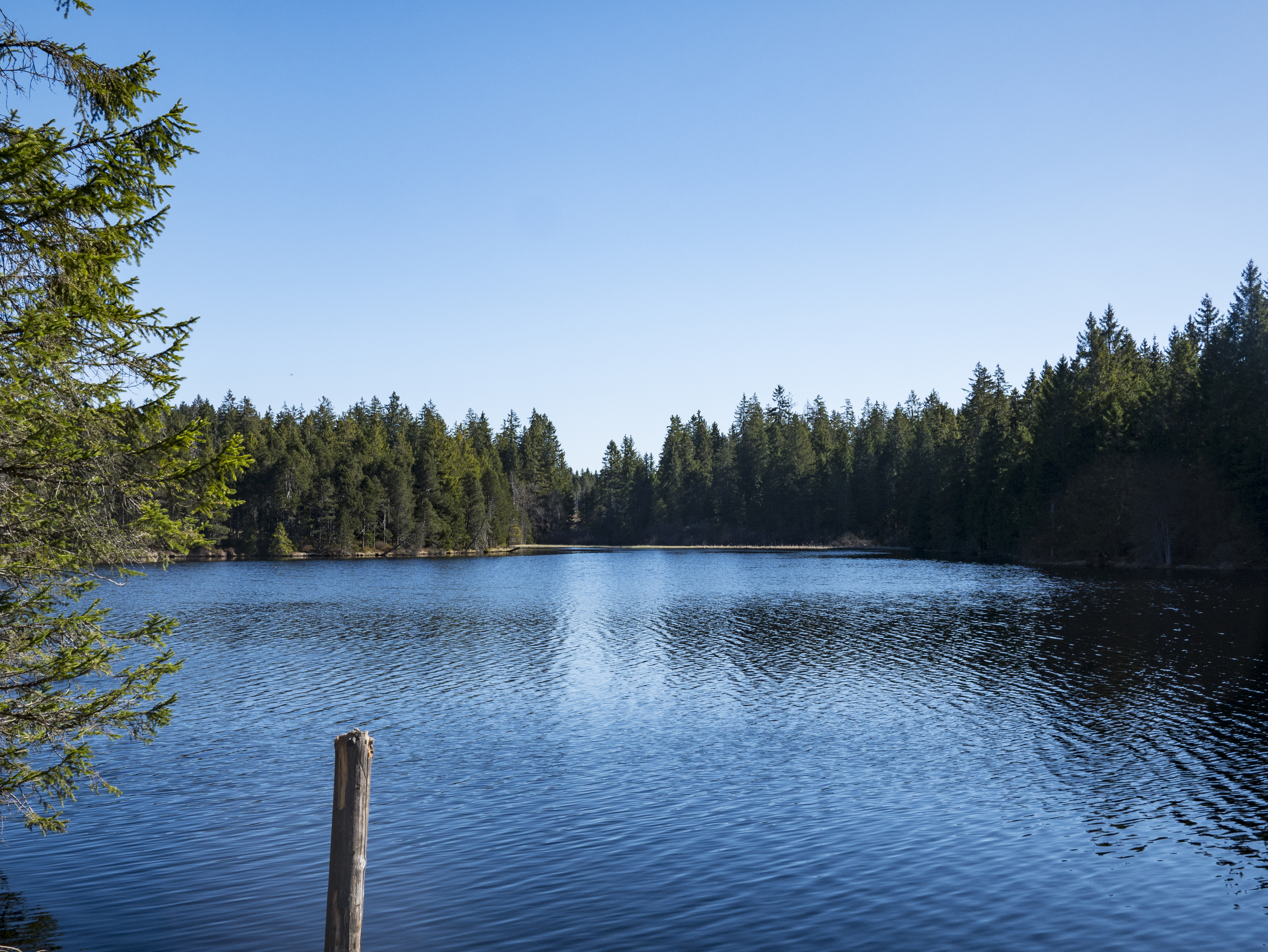 Étang de la Gruère, Saignelégier, Jura, Schweiz